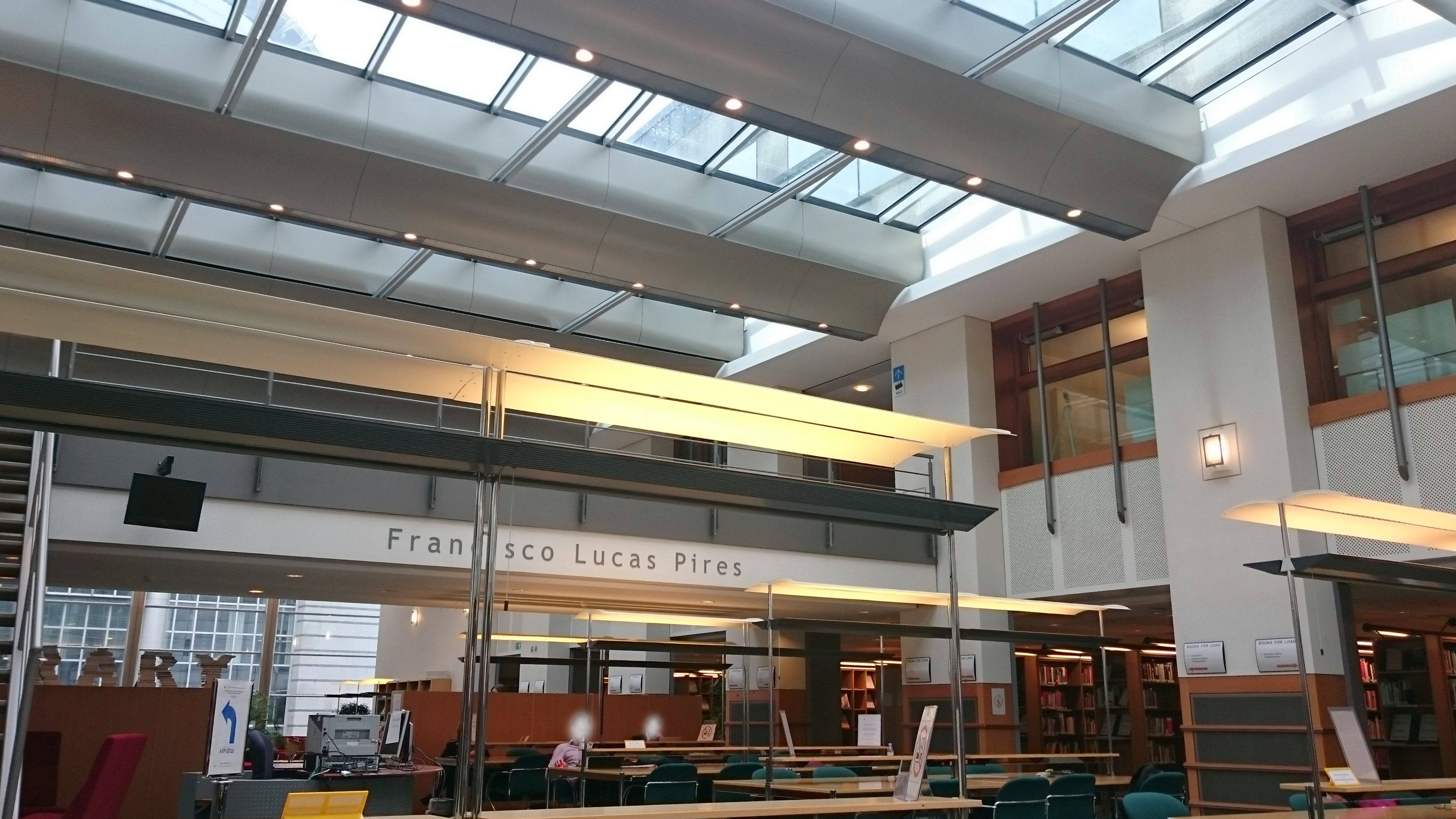 La bibliothèque Francisco Lucas Pires dans le bâtiment Altiero Spinelli au Parlement européen de Bruxelles. Les visages ont été floutés.